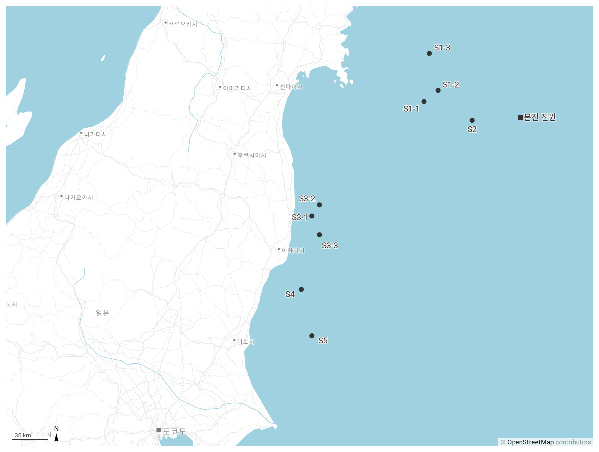 도호쿠 지방 태평양 해역 지진 당시 각 소사건들이 일어난 지역의 좌표. 논문 참조